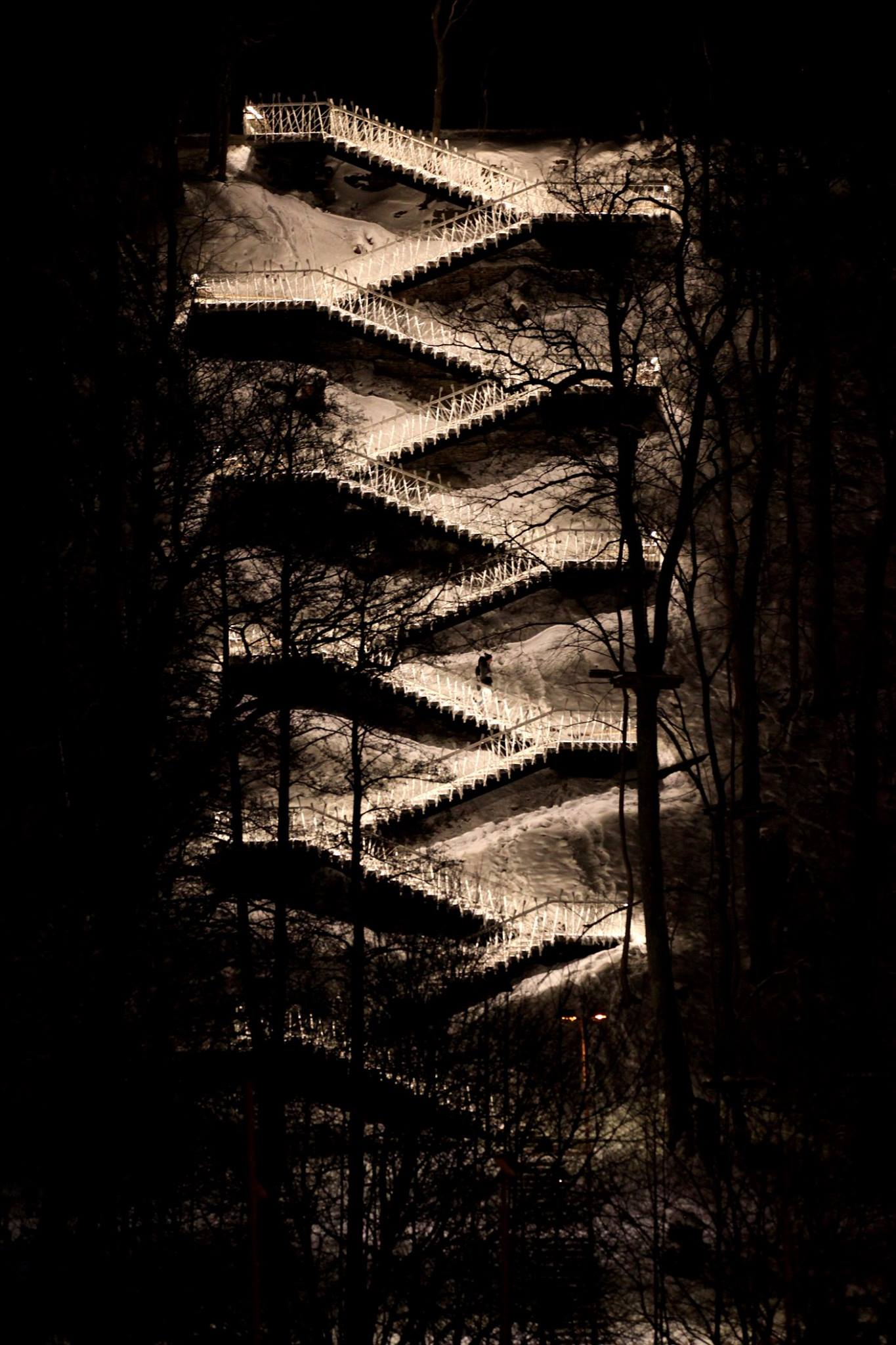 Vaade Põhjakonna trepile Veere teelt.